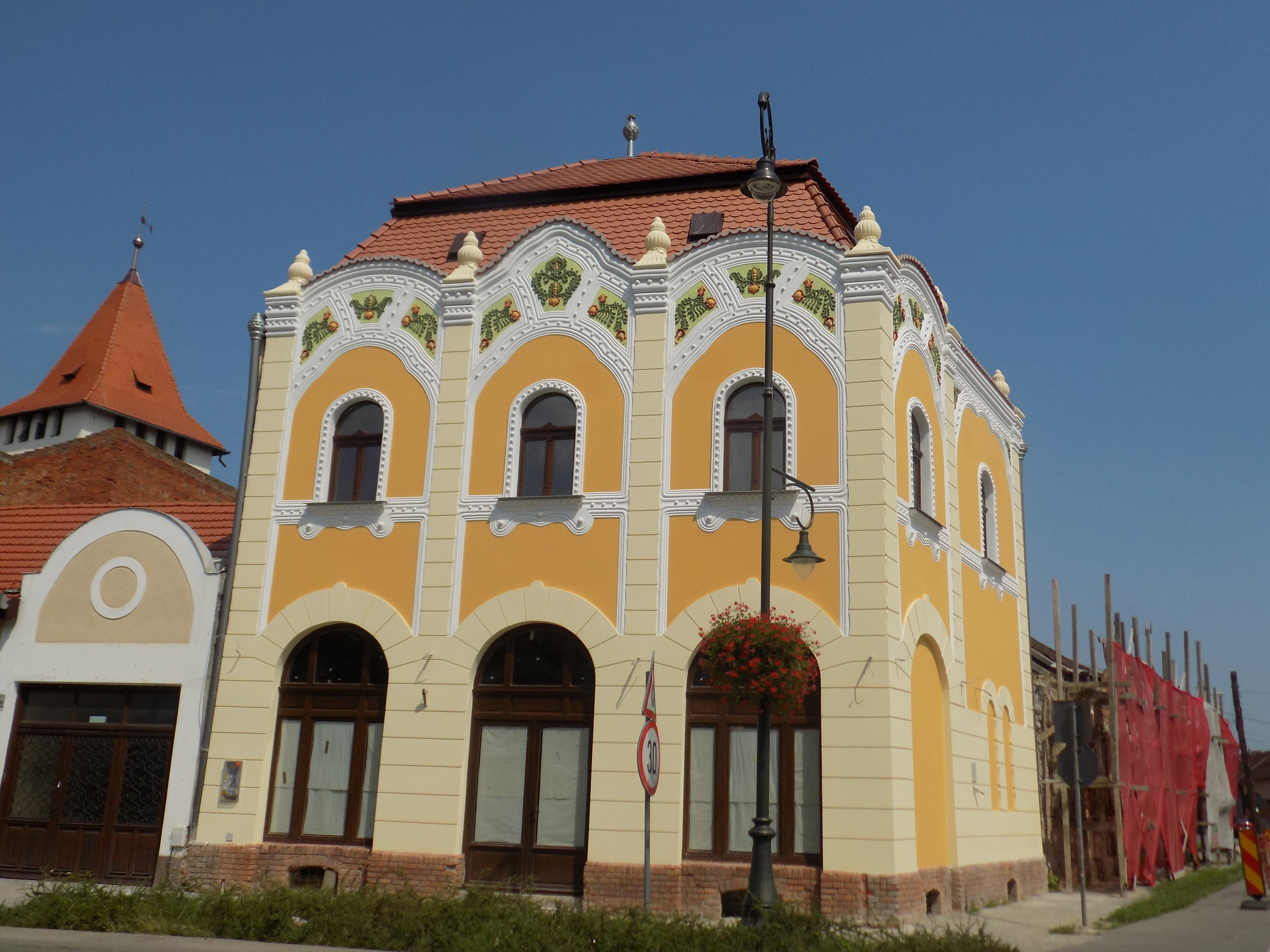 Fertigstellung 04